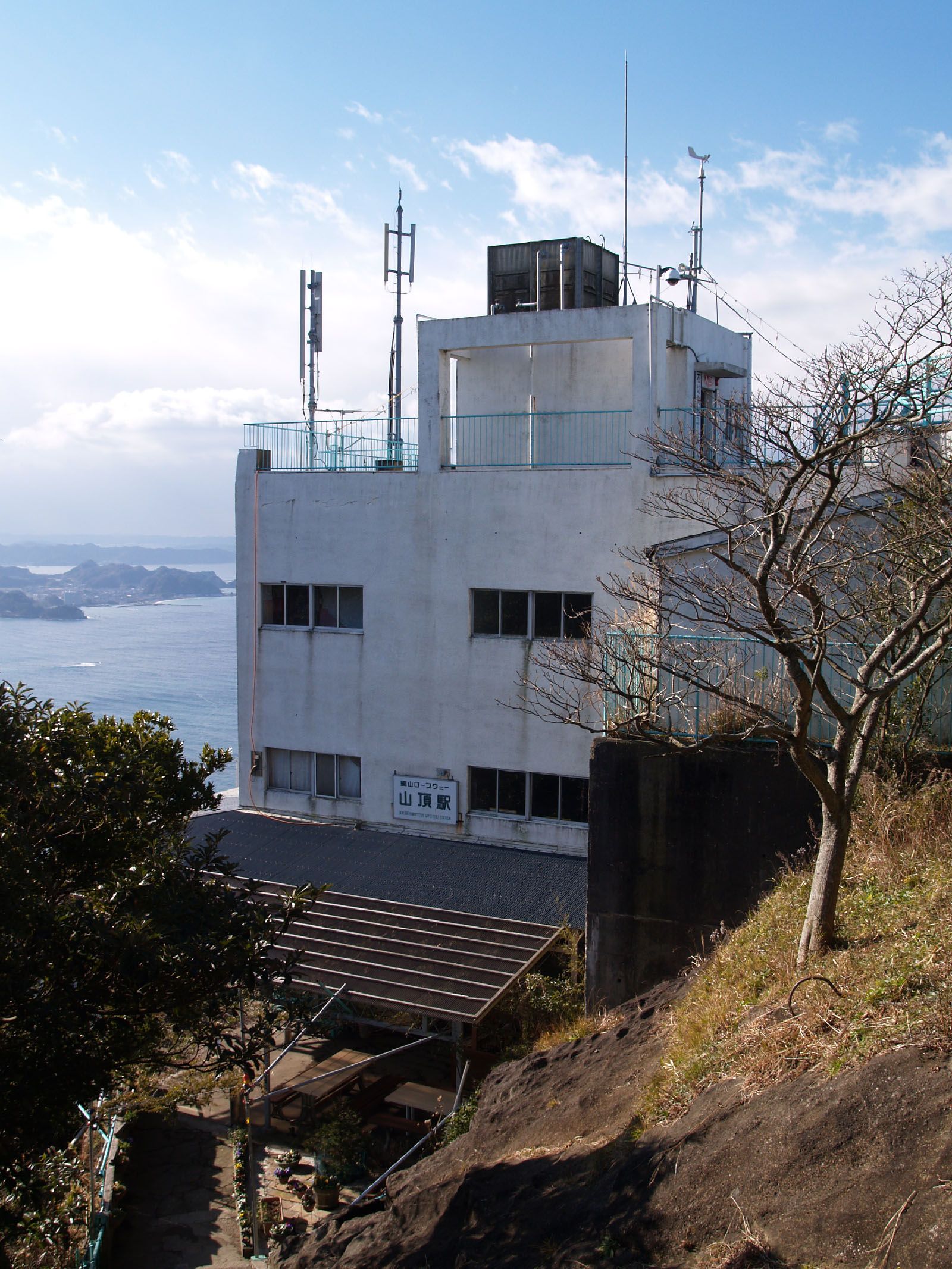 鋸山ロープウェイ山頂駅